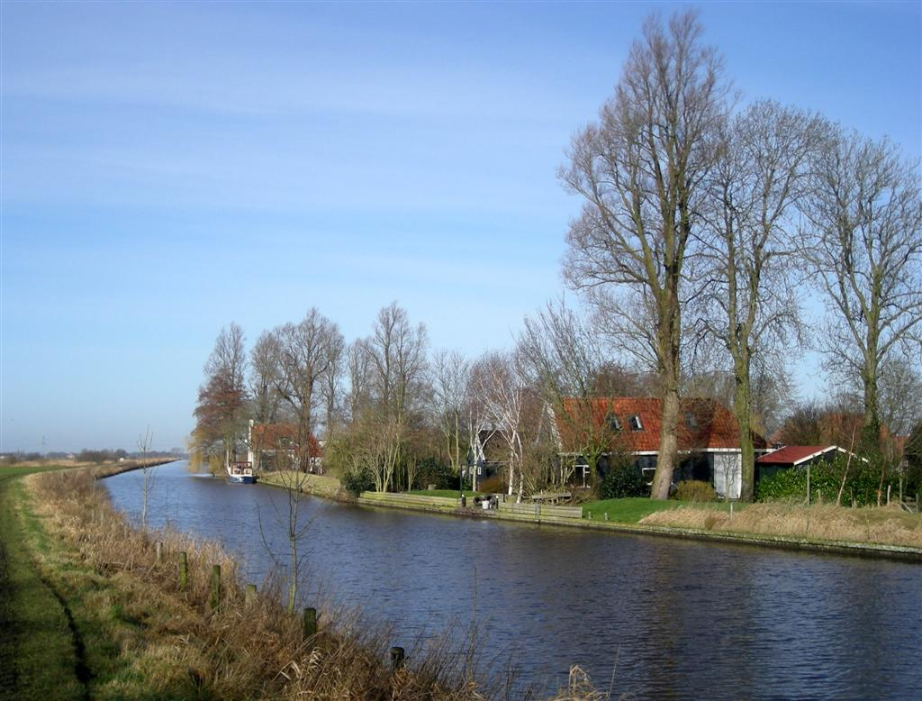 Schipsloot (Skipsleat) bij Nijelamer, tussen de Tjonger en Wolvega